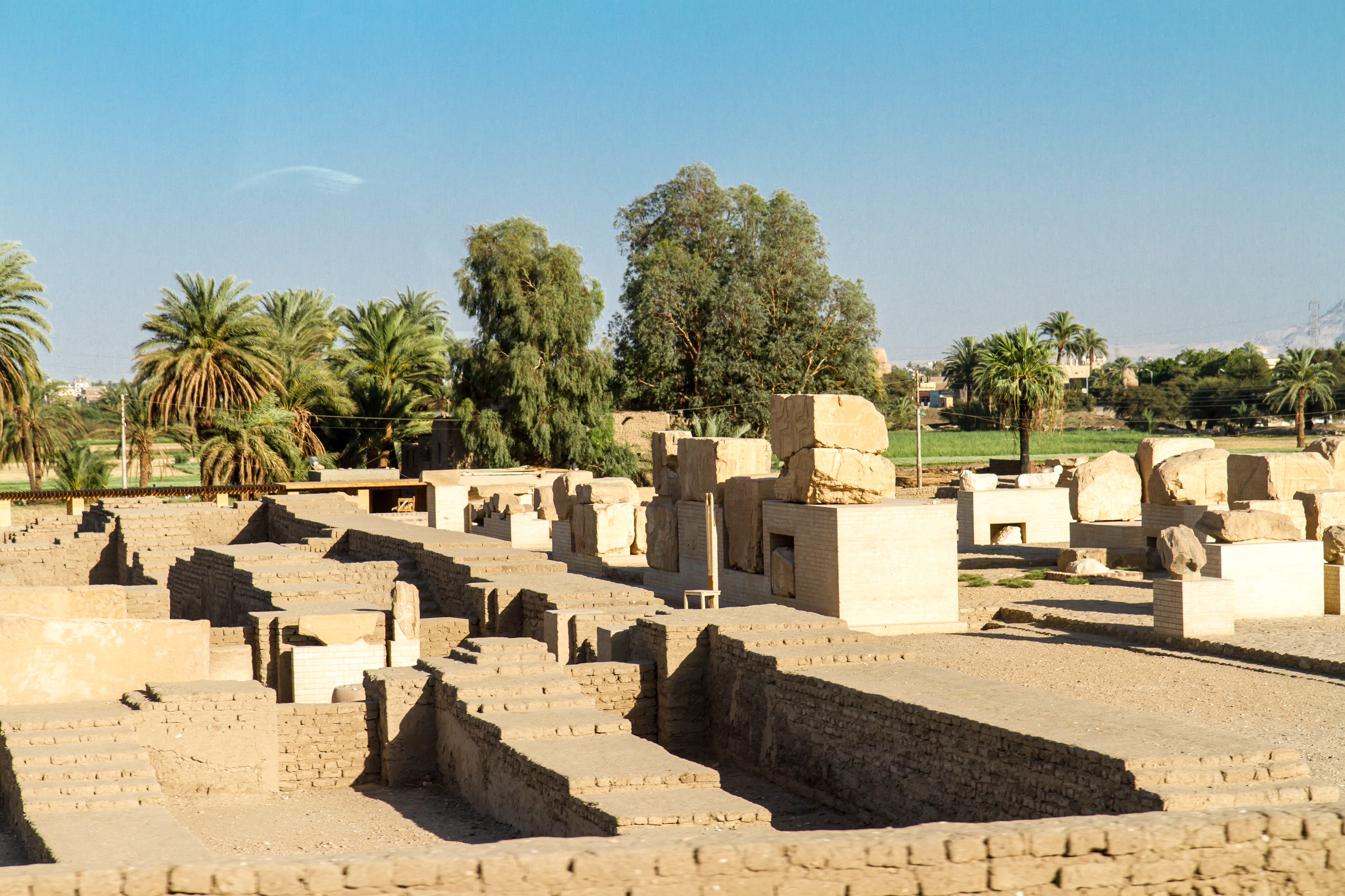 Al Bairat, Luxor, Luxor Governorate, Egypt